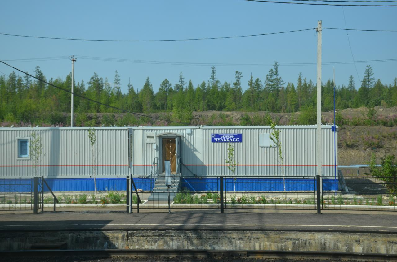 Поездка 5-6 августа 2019 г. по маршруту Якутск - Нерюнгри - Якутск во вновь назначенном поезде № 327 Нижний Бестях - Нерюнгри. Историческое событие - пуск пассажирского движения поездов из центральной Якутии, почти из Якутска.Железнодорожная станция Чульбасс